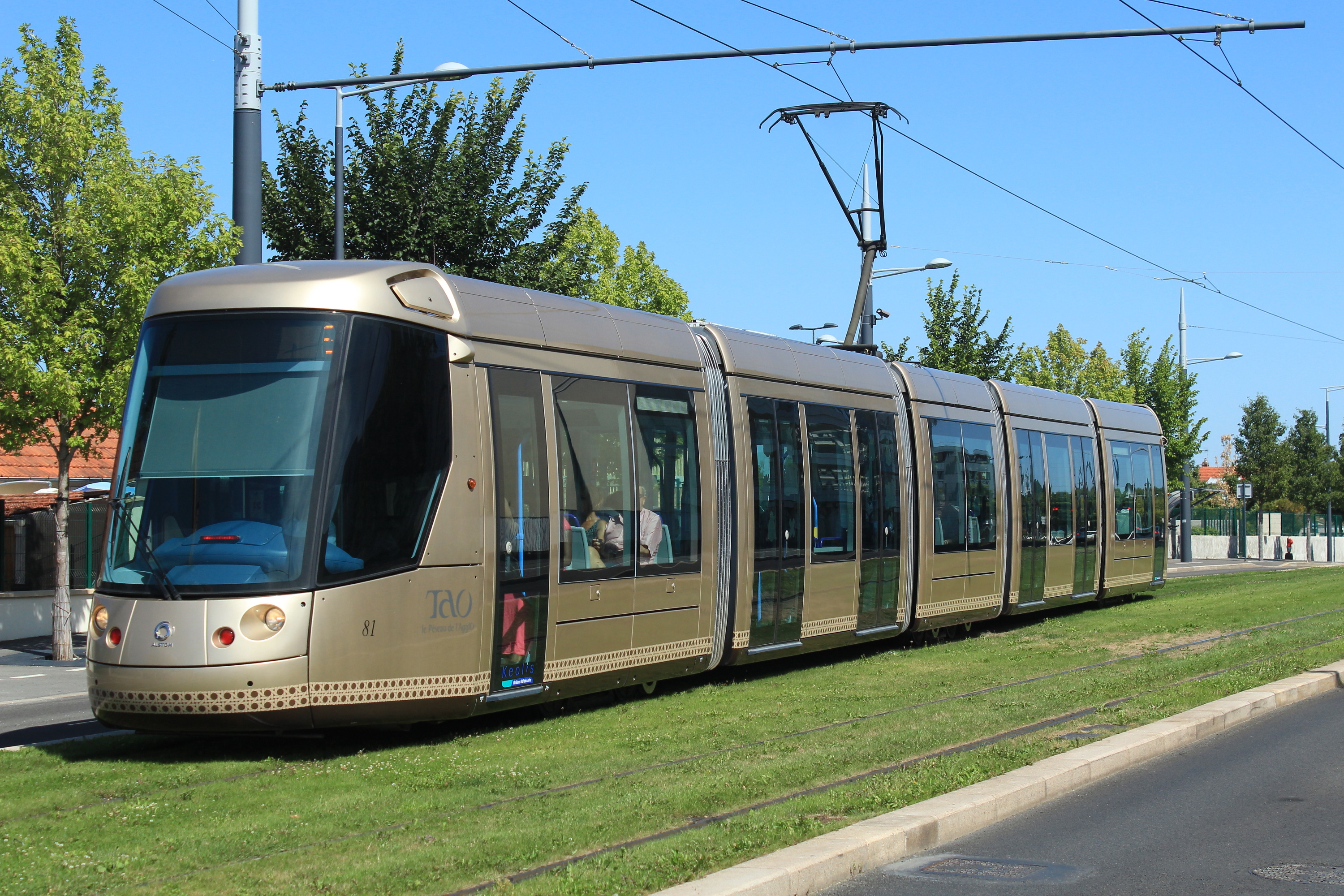 Tramway (Citadis 302) près de la station Mozart à Orléans, boulevard Marie Stuart.